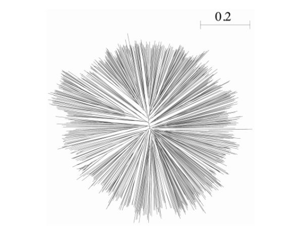 Fylogenetický strom vytvořen Clustalem W . Chenna, 2003